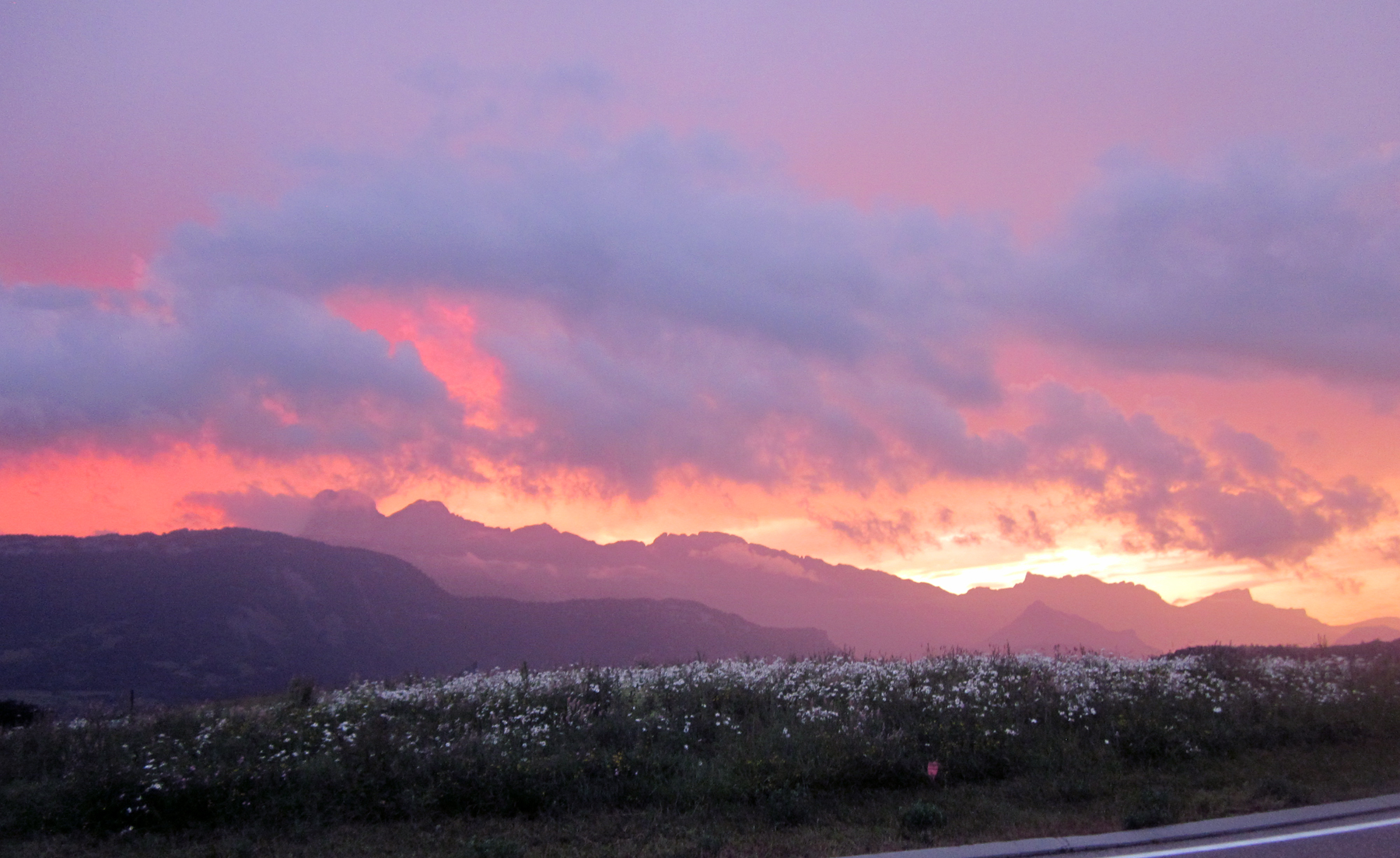 Sunset near Sinard, dép. de l'Isère, France.